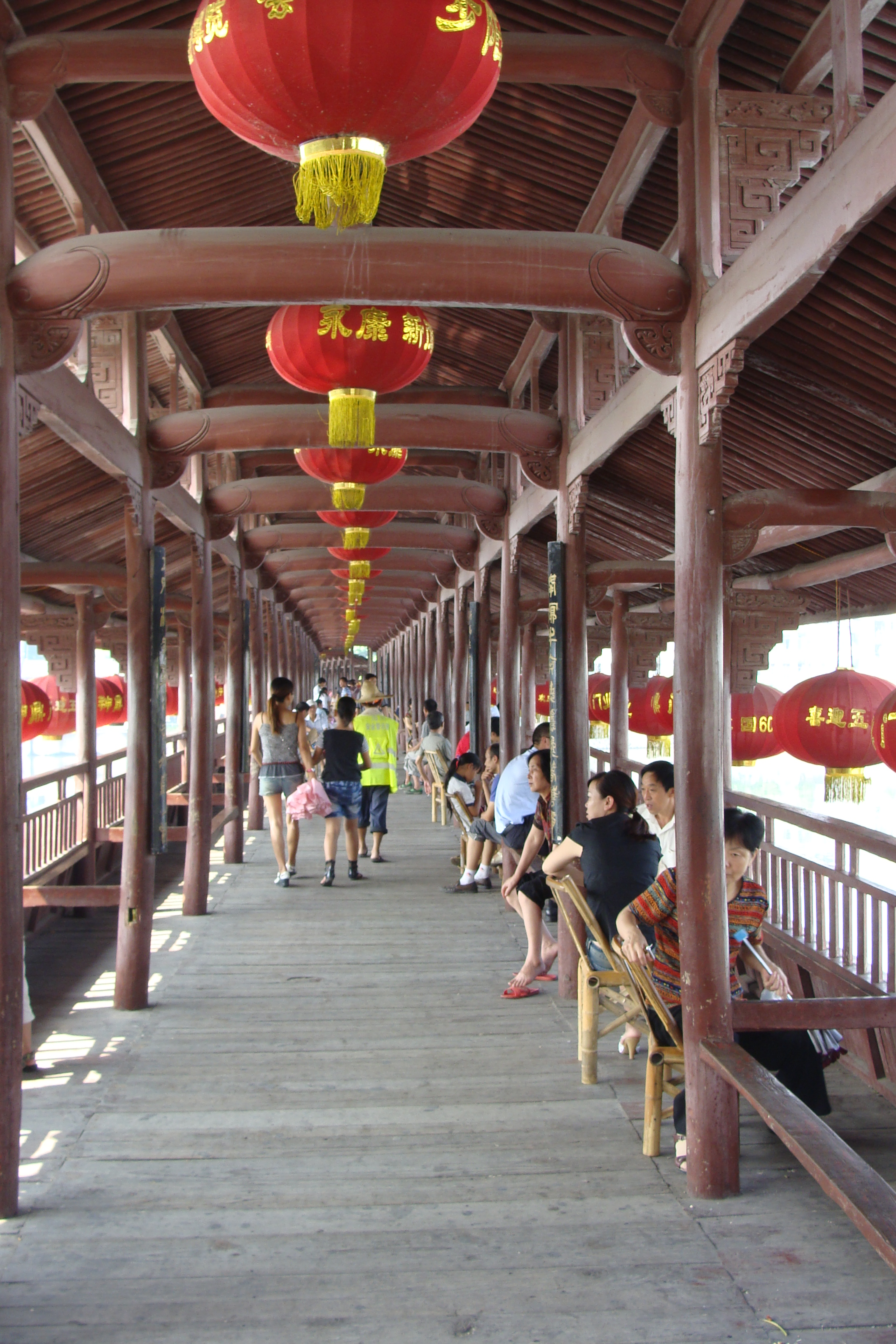 西津桥蜿蜒的桥廊内